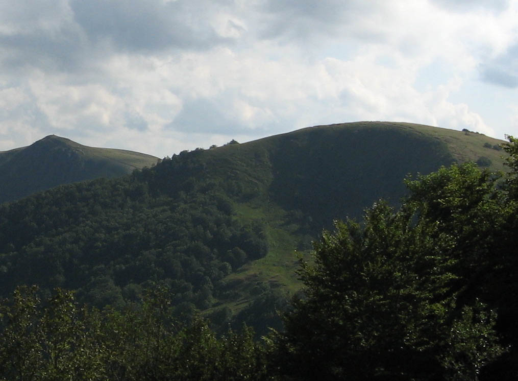 Le sommet et le cirque du versant est du Rainkopf (massif des Vosges)